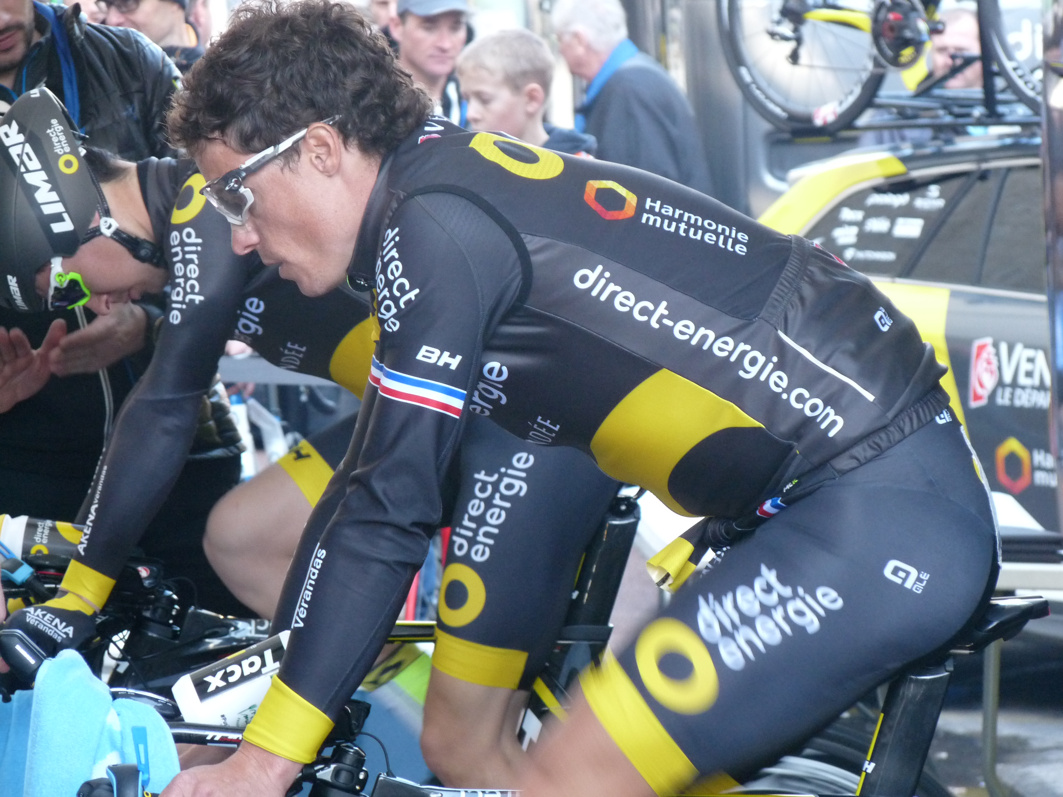 Sylvain Chavanel à l'échauffement avant le contre la montre de l'Étoile de Bessèges 2016 Depicted person: Sylvain Chavanel Depicted team: Direct Énergie